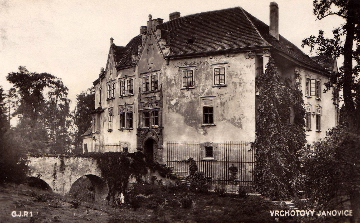 Zámek Vrchotovy Janovice, dobová pohlednice.